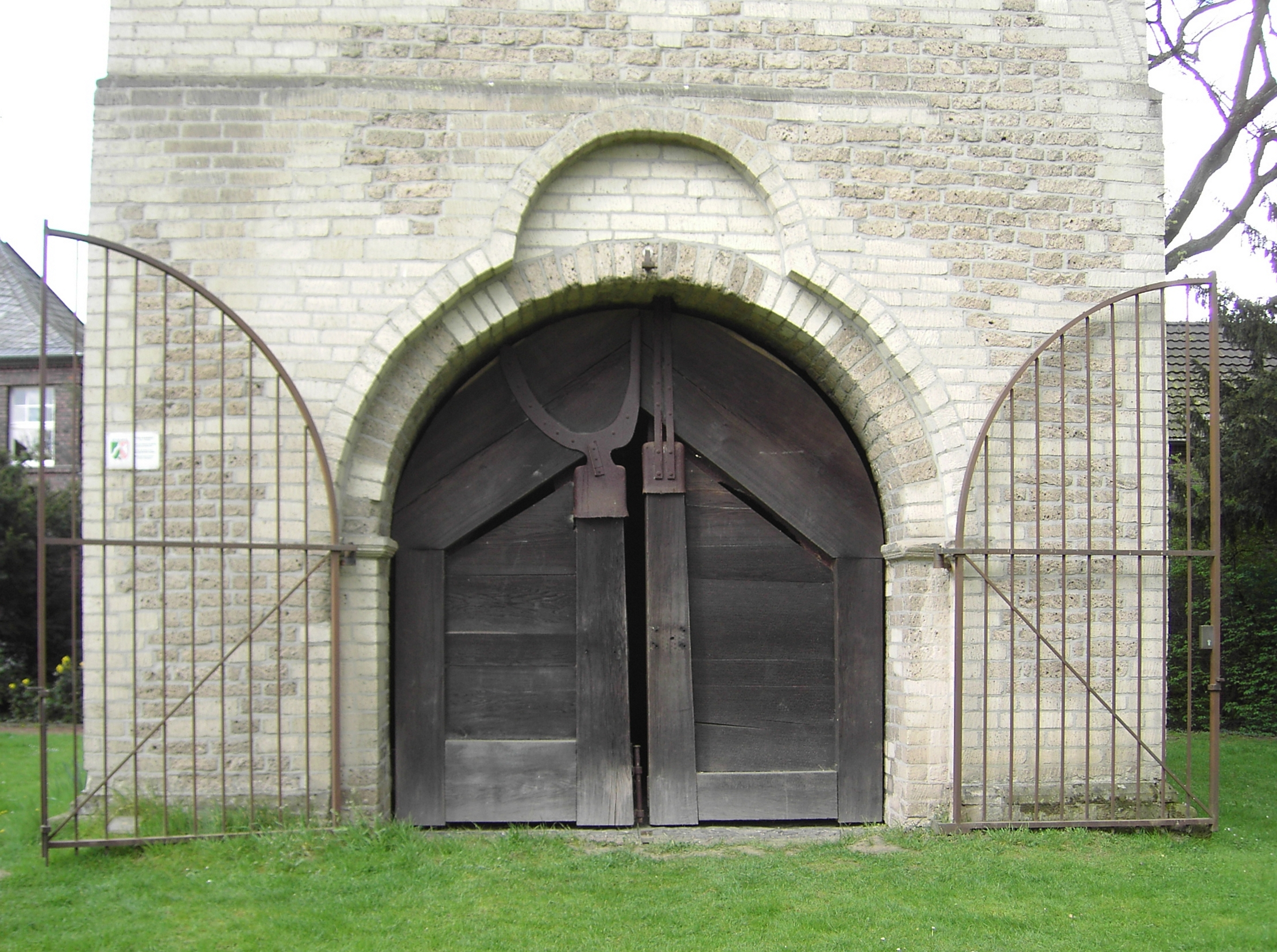 Joseph Beuys: Türe am Alten Kirchturm, 1959, Meerbusch-Büderich